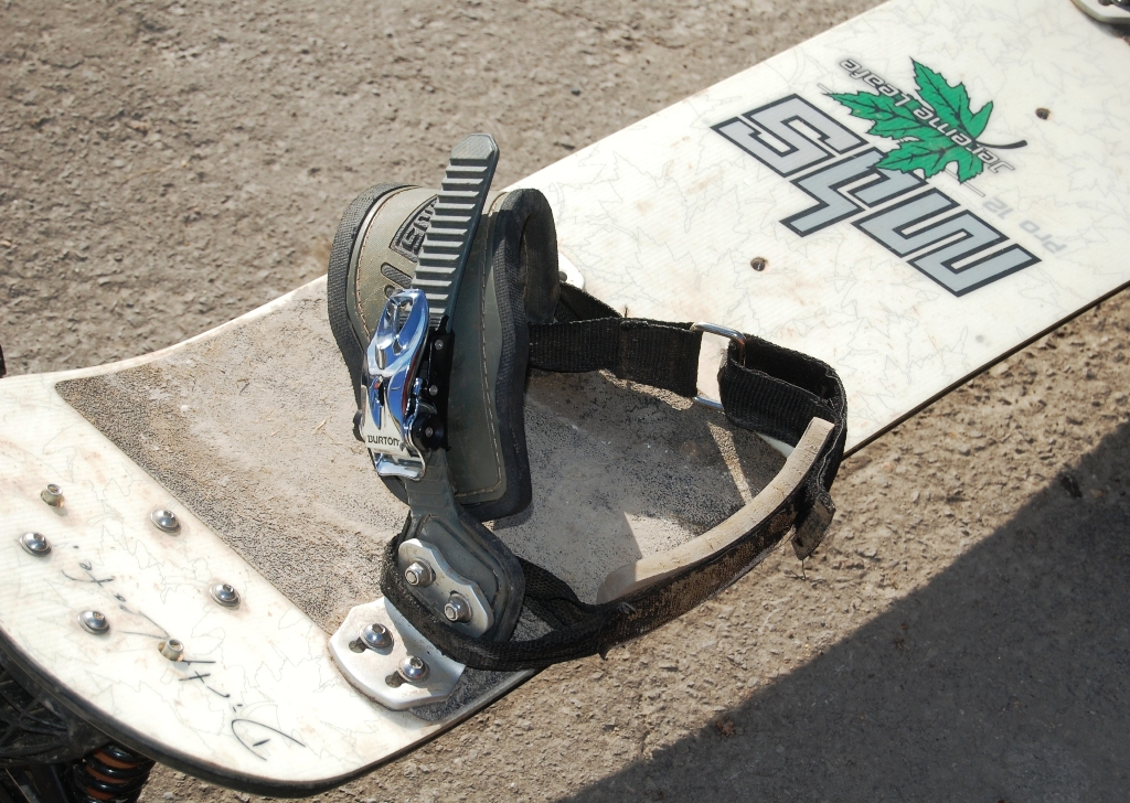 Fijacion de carraca